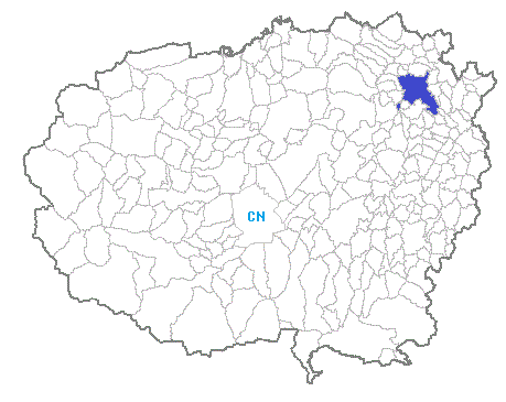 Posizione del comune nella provincia di Cuneo